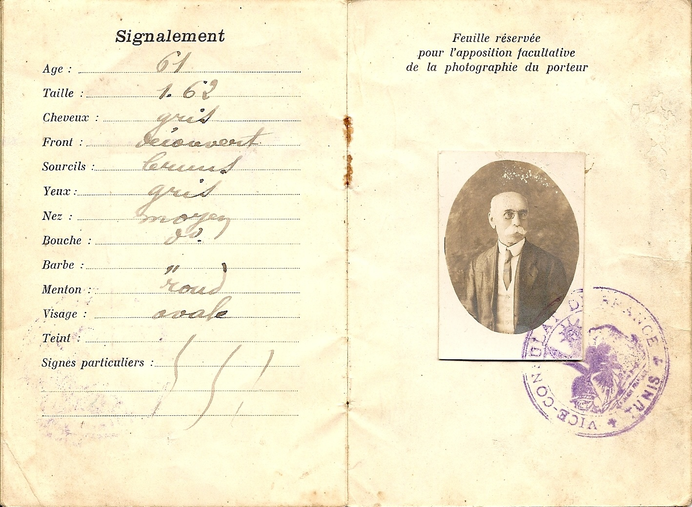 Passeport émis par le Consulat général de Tunis en 1925 - pages 4 et 5